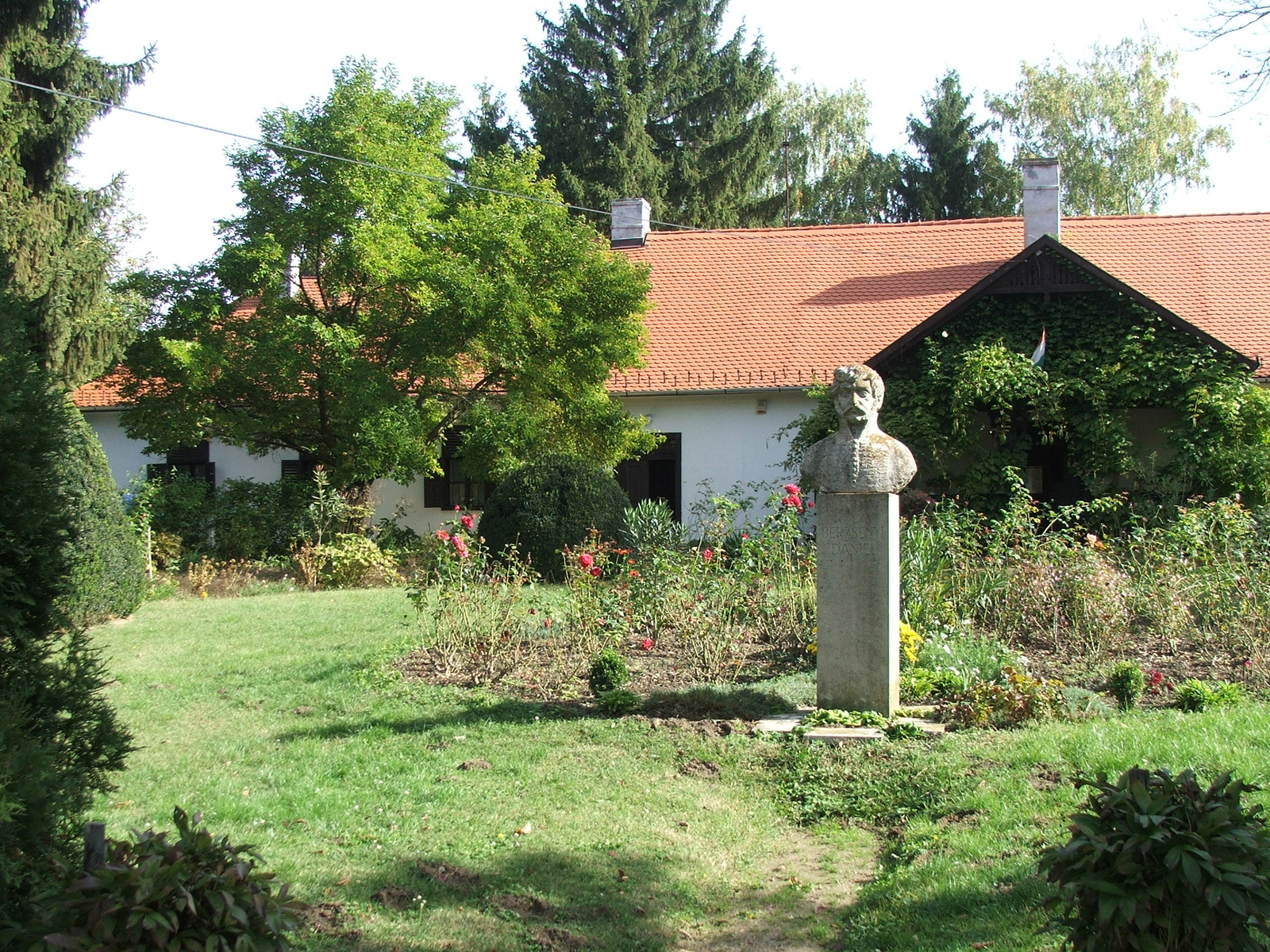 Berzsenyi-kúria (Nikla, Berzsenyi Dániel utca 96.) This is a photo of a monument in Hungary. Identifier: 8042